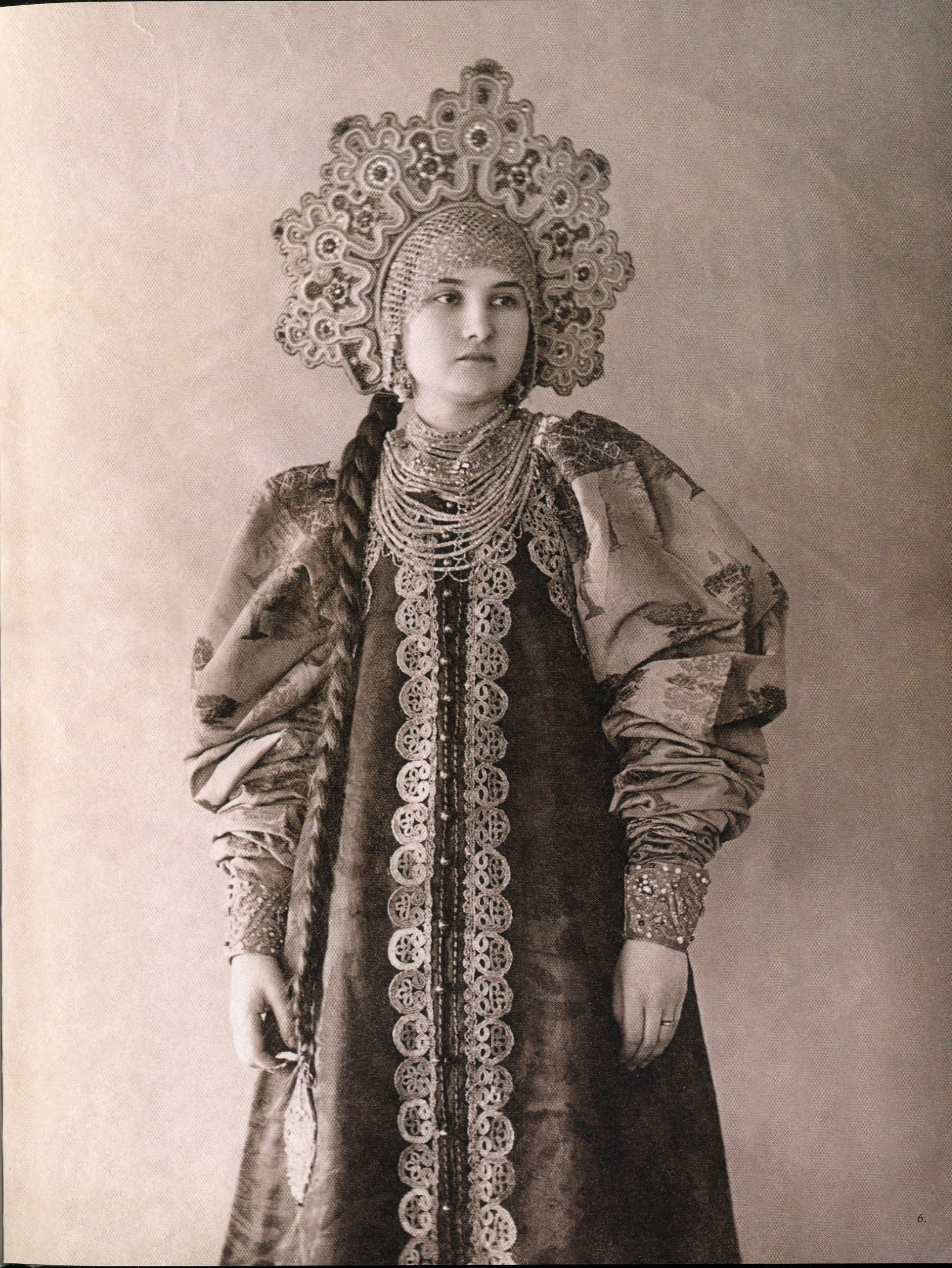 Девушка в -венце-. Архангельская губ. Фотография 1900-х гг.